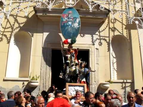 Statua di S.Giorgio in processione